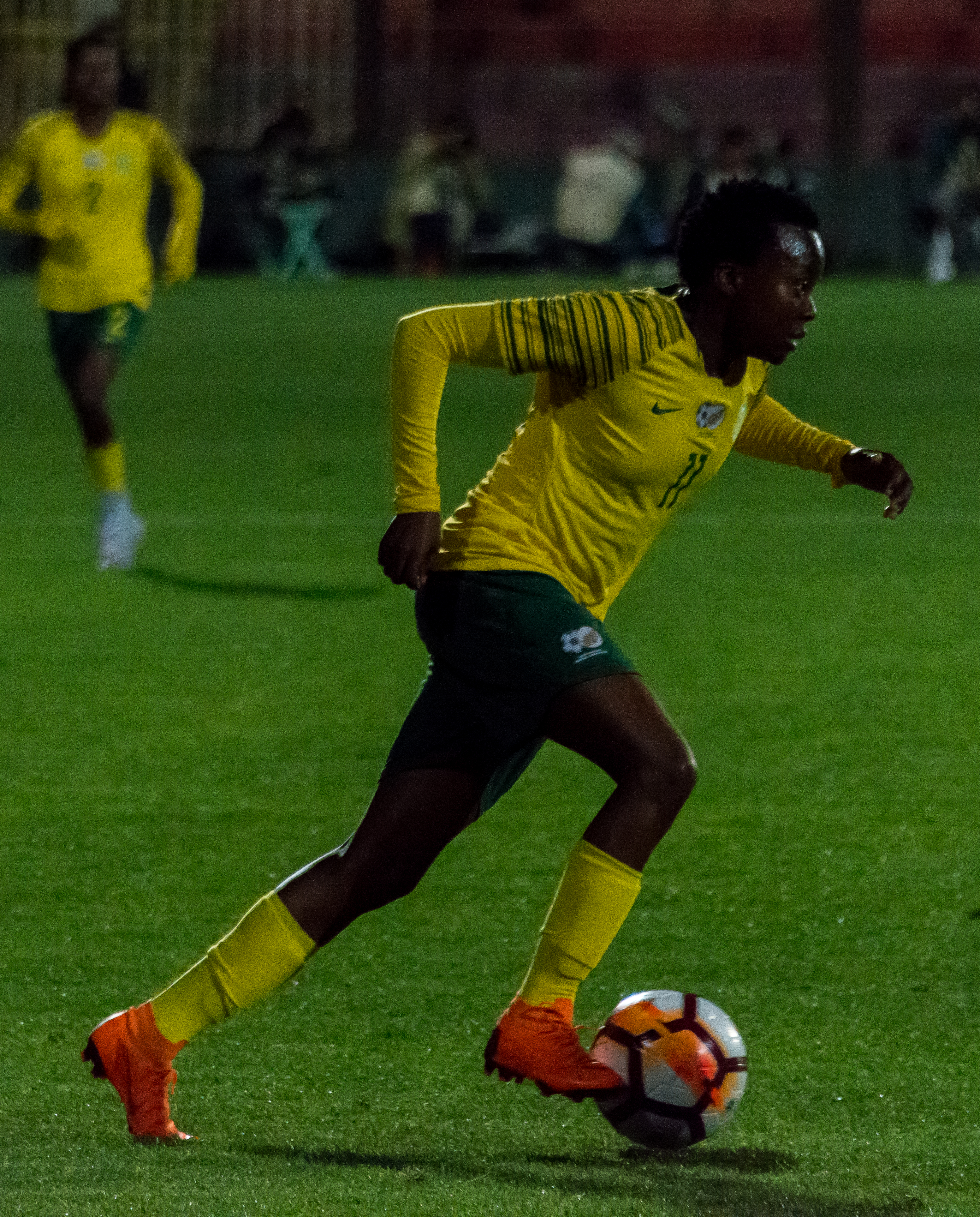 Thembi Kgatana, Chile v Sudáfrica, Estadio Santa Laura, Independencia, Santiago, Chile.